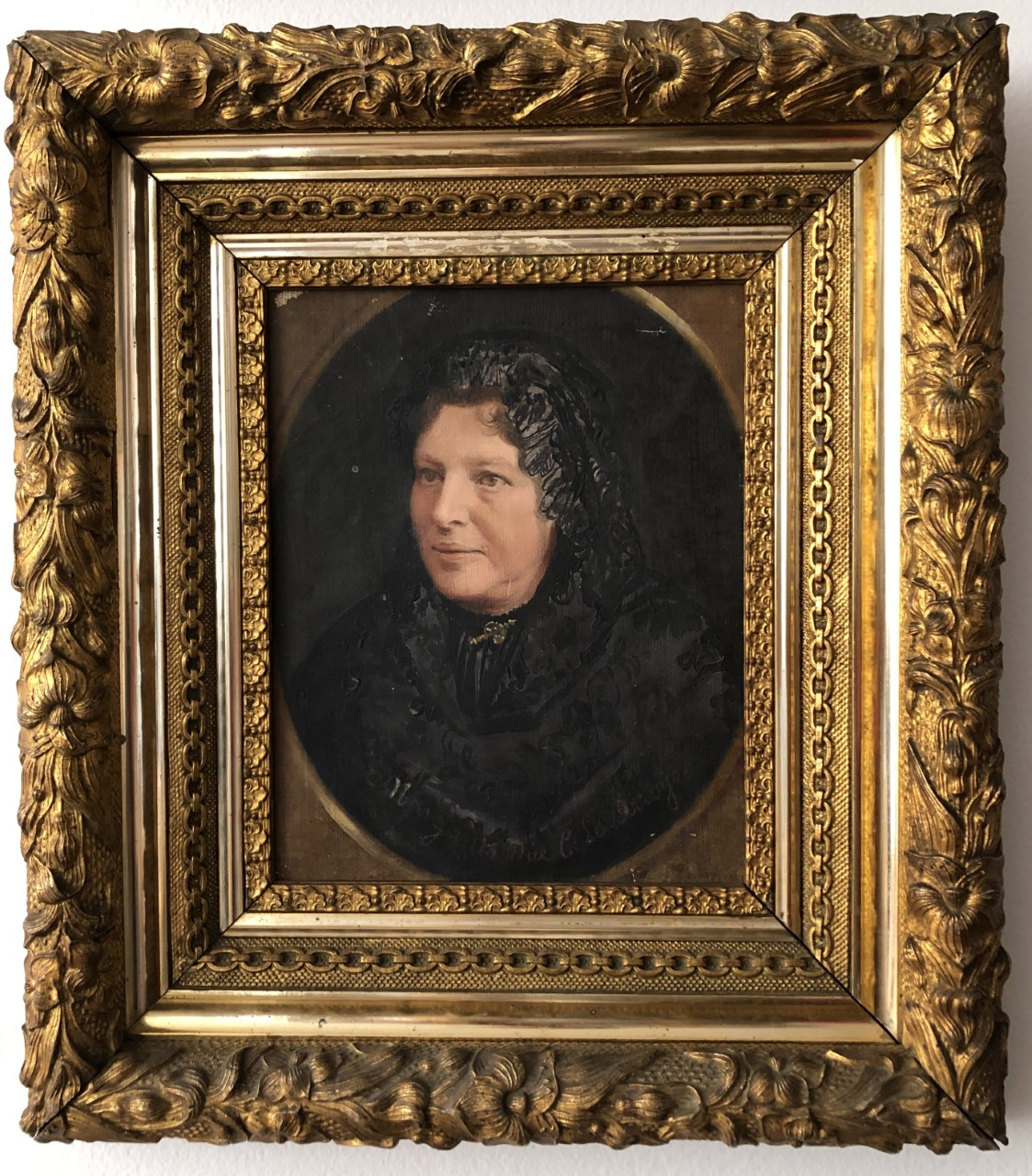 Retrato al óleo de la esposa del último Gobernador del Cauca Grande